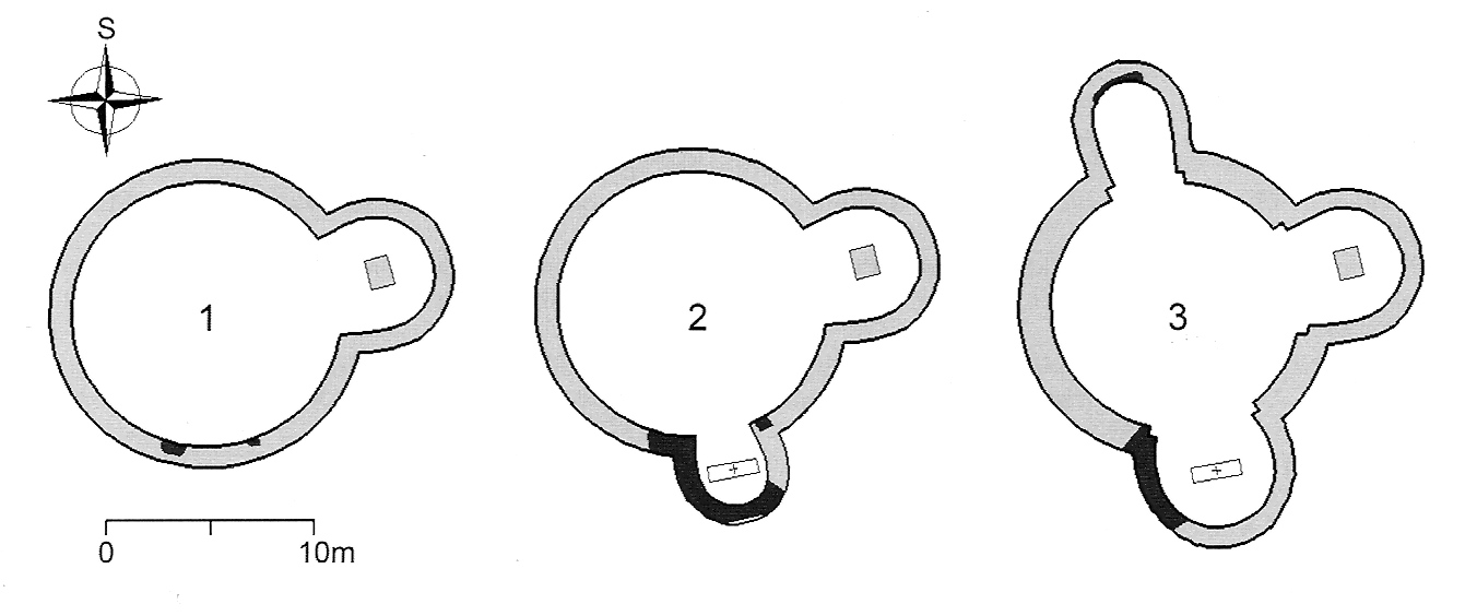 Rekonstrukce jednotlivých stavebních fází na základě nově zaměřených a nově vynesených fragmentů